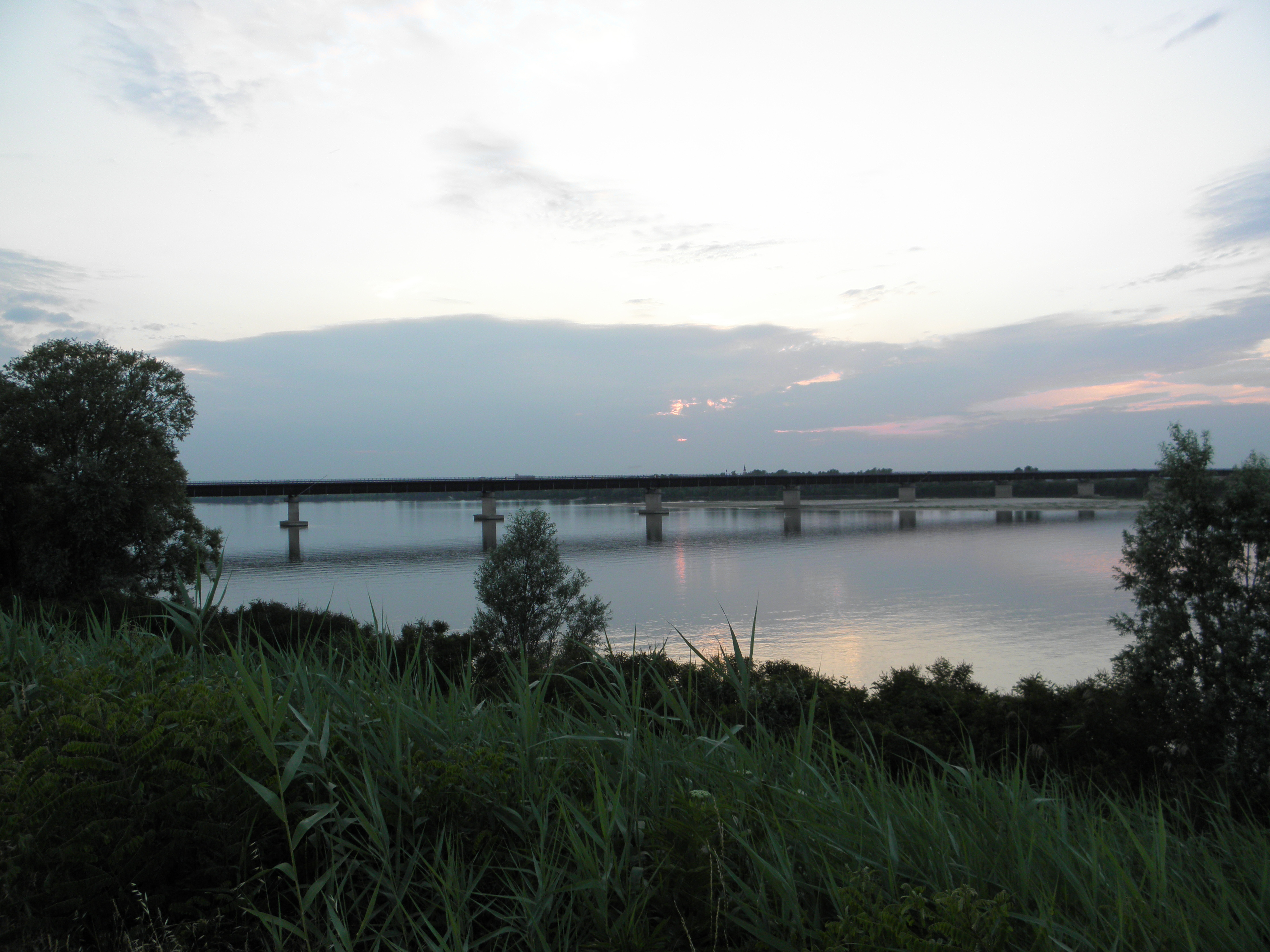 Corbola: il ponte della provinciale 495 che attraversa il fiume Po tra il comune di Adria e quello di Corbola.